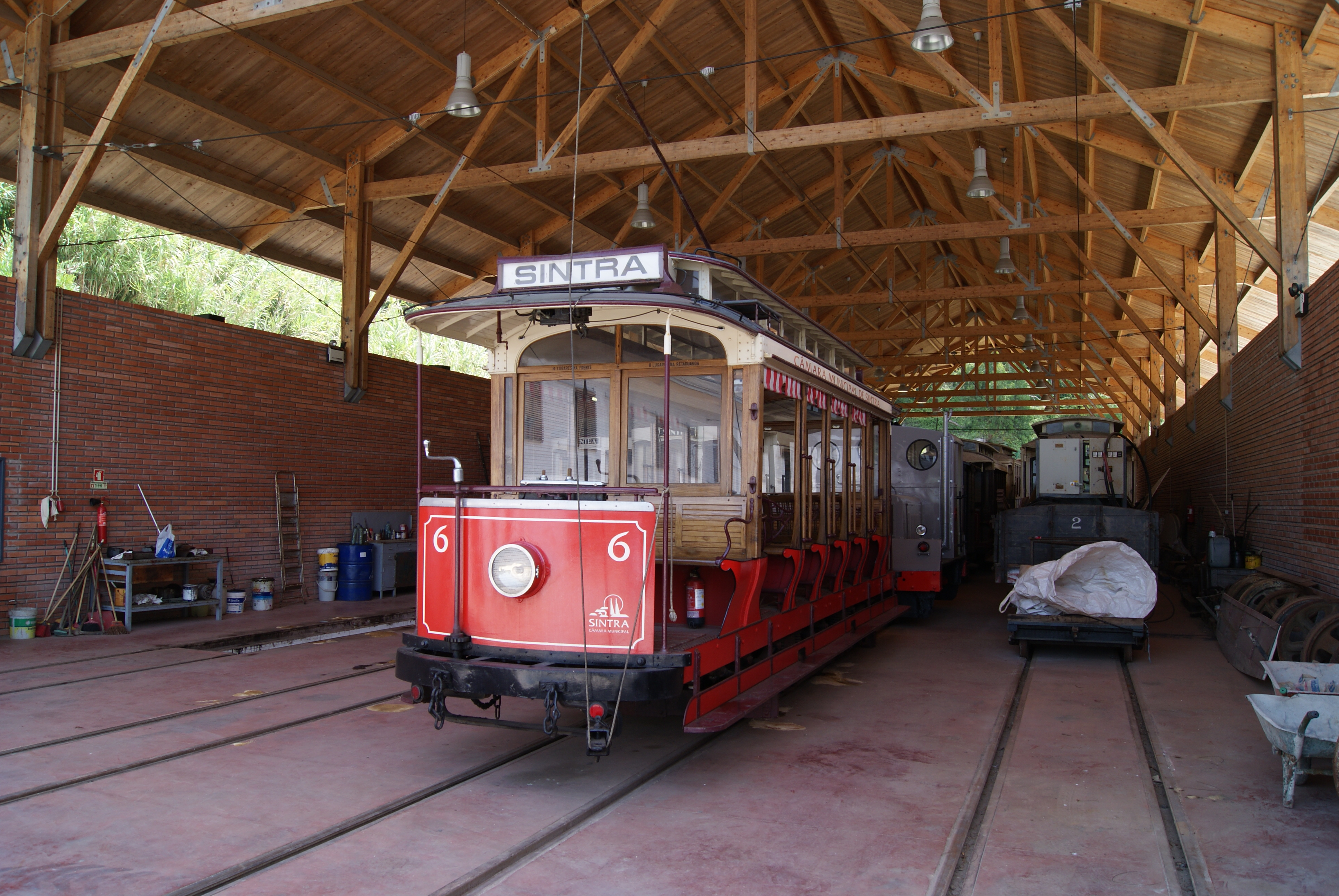 Photo: Trams aux Fils. Magnifique ligne de trams avec des employés très aimables, points négatifs, trouver le départ du tram depuis la gare du train, car vous ne trouverez aucune indication, et pour les amateurs de trams, pas de cartes postales, pas de revues sur le tram, pas de maquettes de trams, comme pour les trams de Lisbonne,etc. "Dommage".